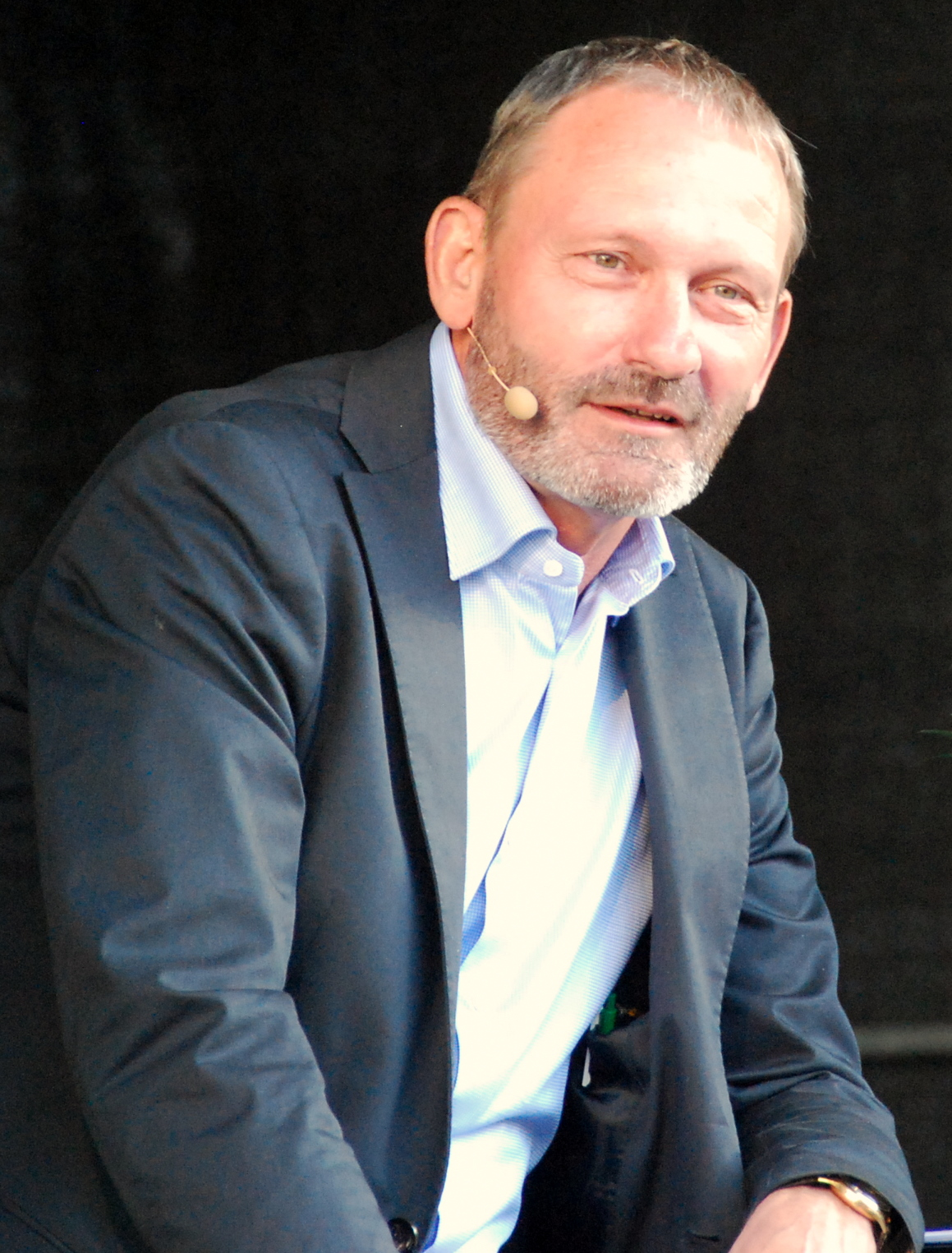 Den tidligere fodboldspiller Preben Elkjær. Her i forbindelse med et arrangement for U-21 Europamesterskabet i fodbold 2011 i Viborg.